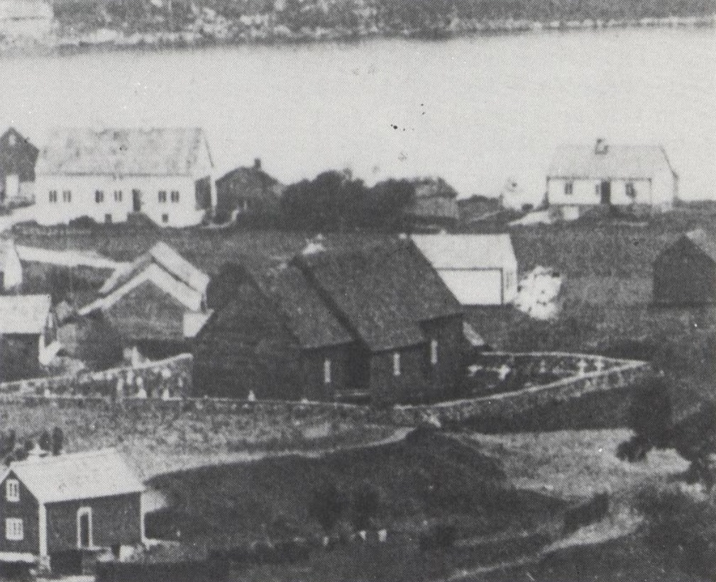 Den tidligere kirken i Jondal som ble revet i 1887. Bilde gjengitt i «Jondal kyrkje 100 år», s. 29.